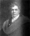 Image of Alexandru G. Golescu (1819 - 1881), Romanian politician, Prime Minister in 1870